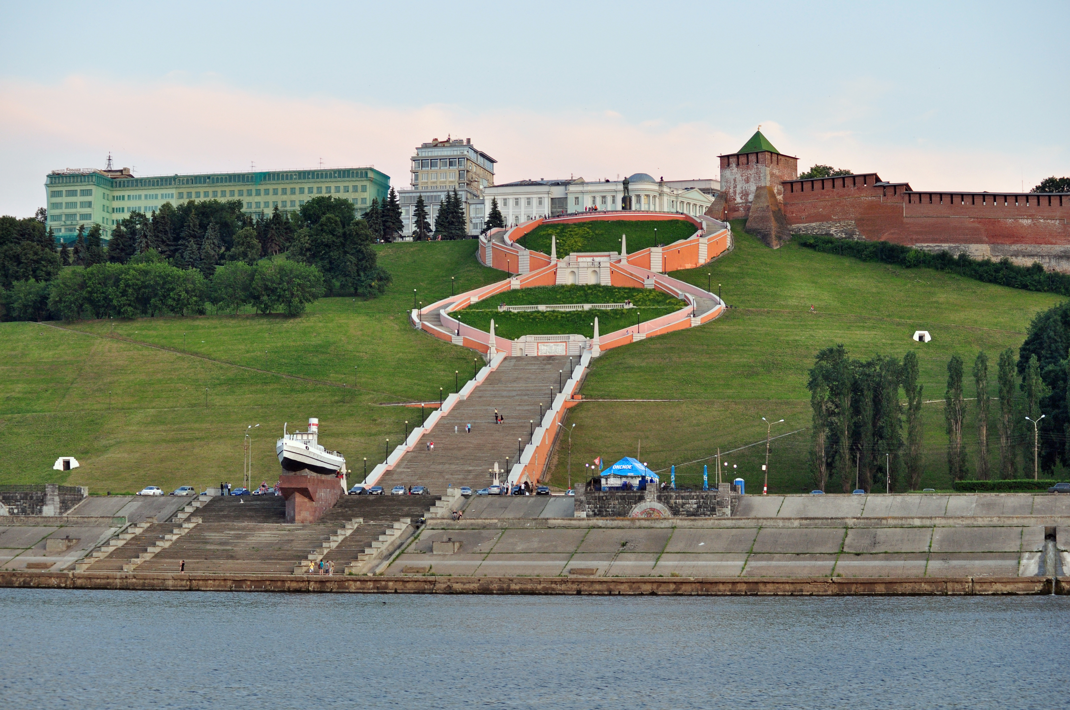 Нижний Новгород. Чкаловская лестница